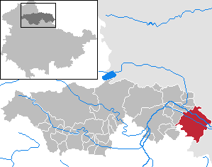 Roßleben-Wiehe im Kyffhäuserkreis, Thüringen